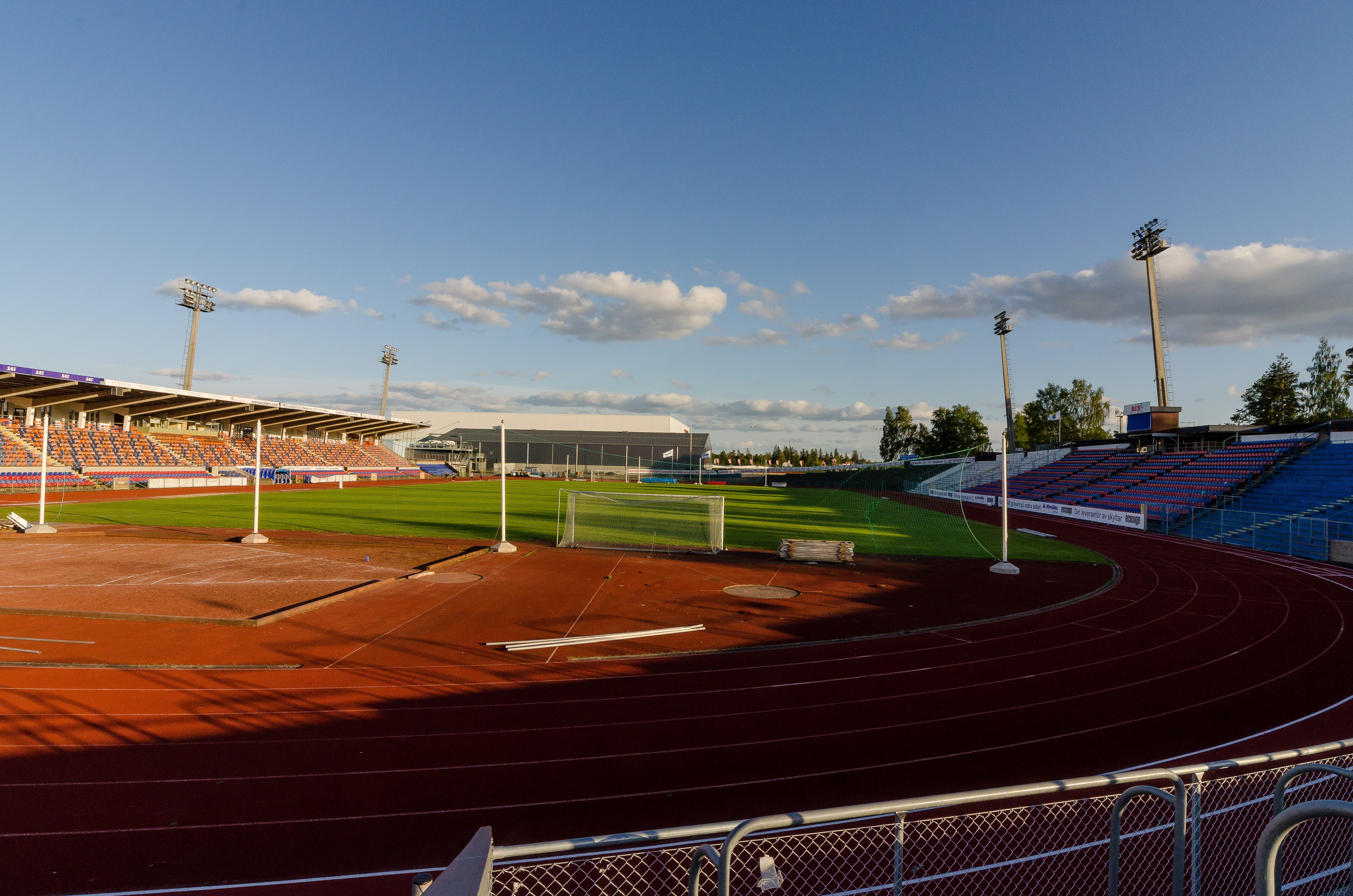 Värendsvallen, huvudsaklig fotbollsarena i Växjö från 1966 till september 2012, från en placering på den numera oftast avstängda norra kortsidan. Mitt i bild bortom planen syns VIDA Arena.